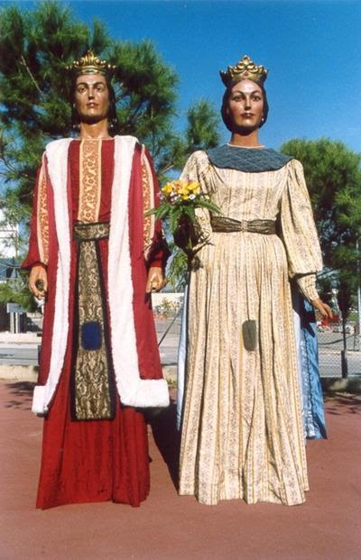 Josep i Paquita